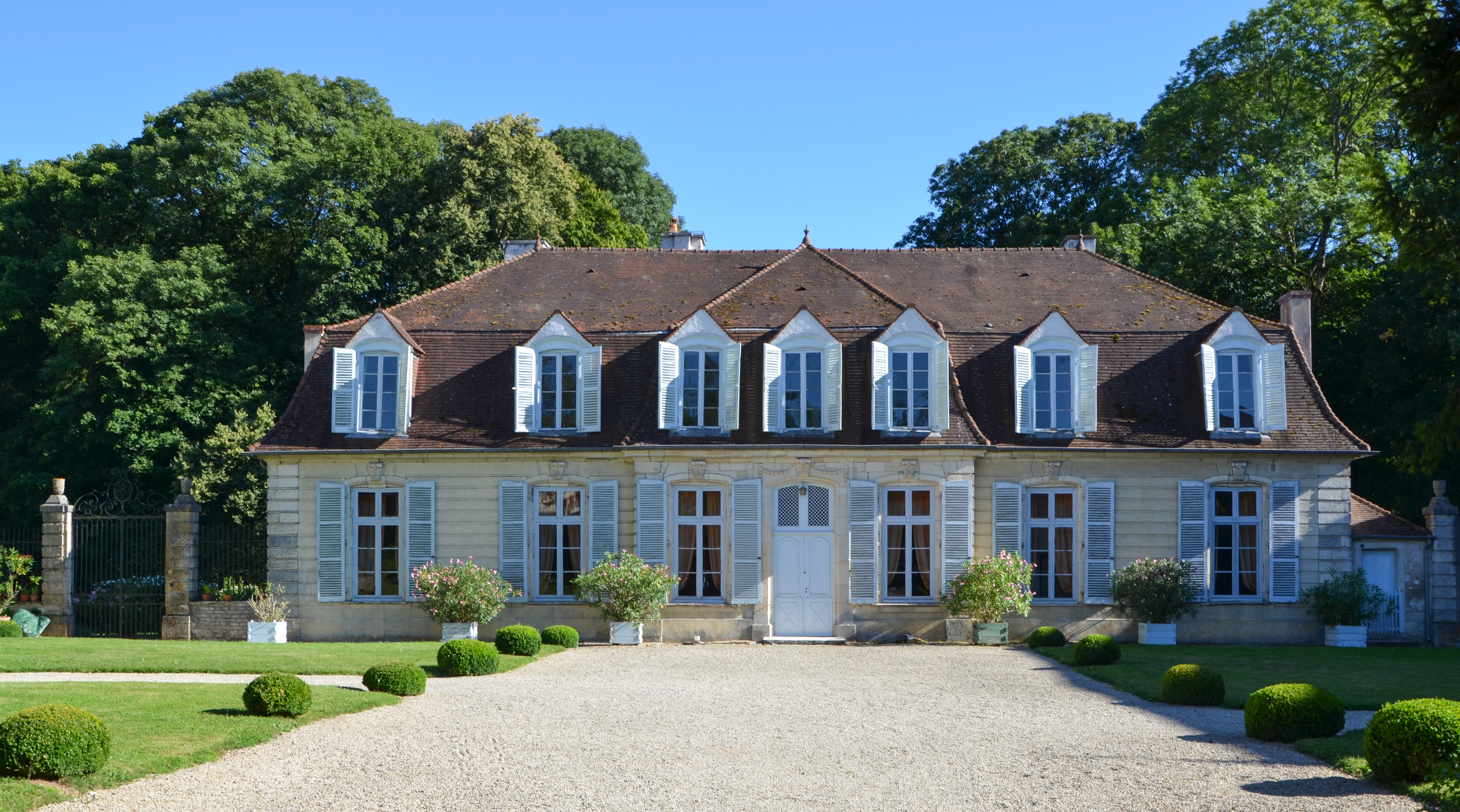 Château de Blagny sur Vingeanne, Côte d'Or, Bourgogne, France. Construction : 18e siècle.